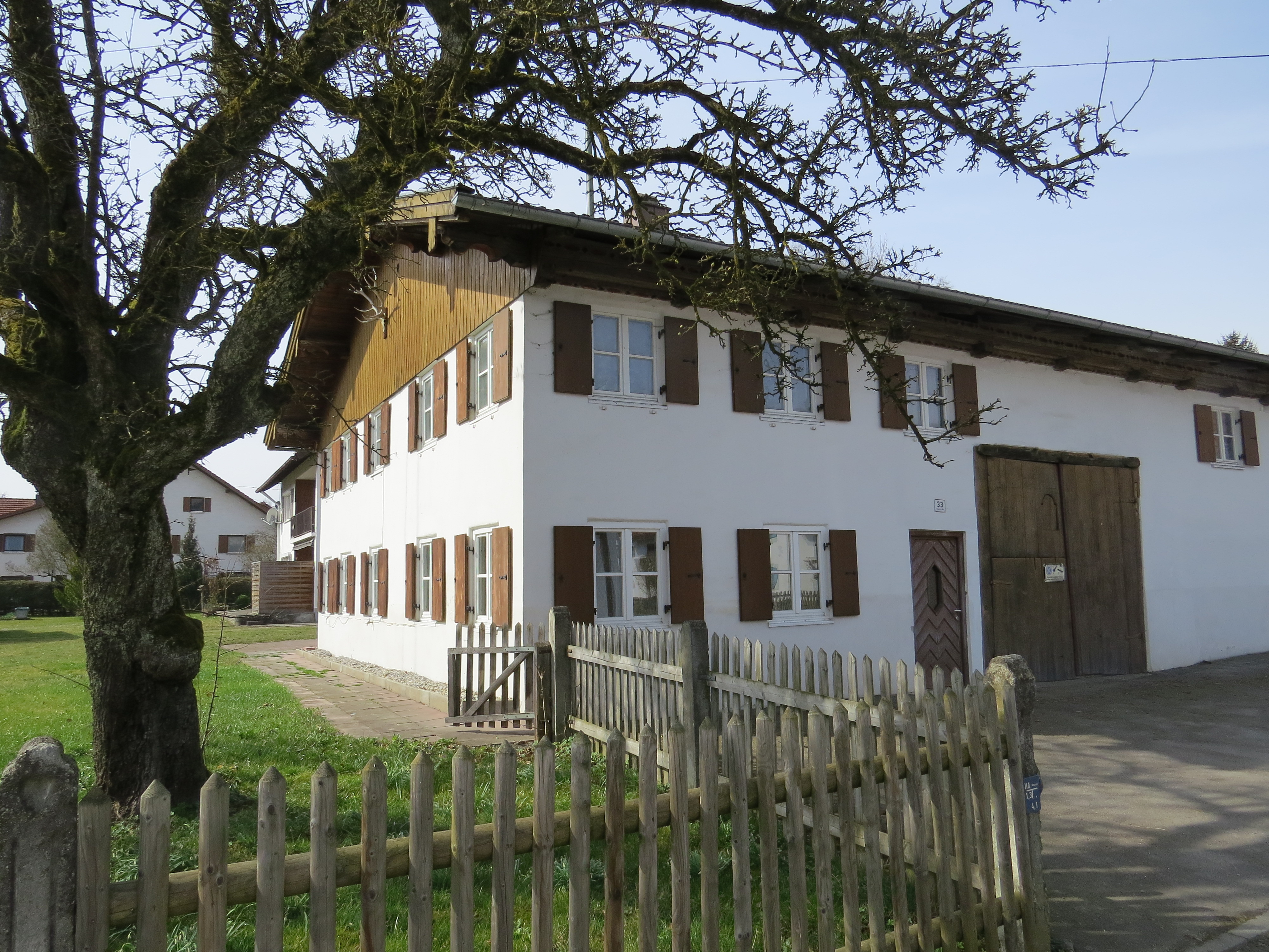 Hauptstr. 33 in Denklingen